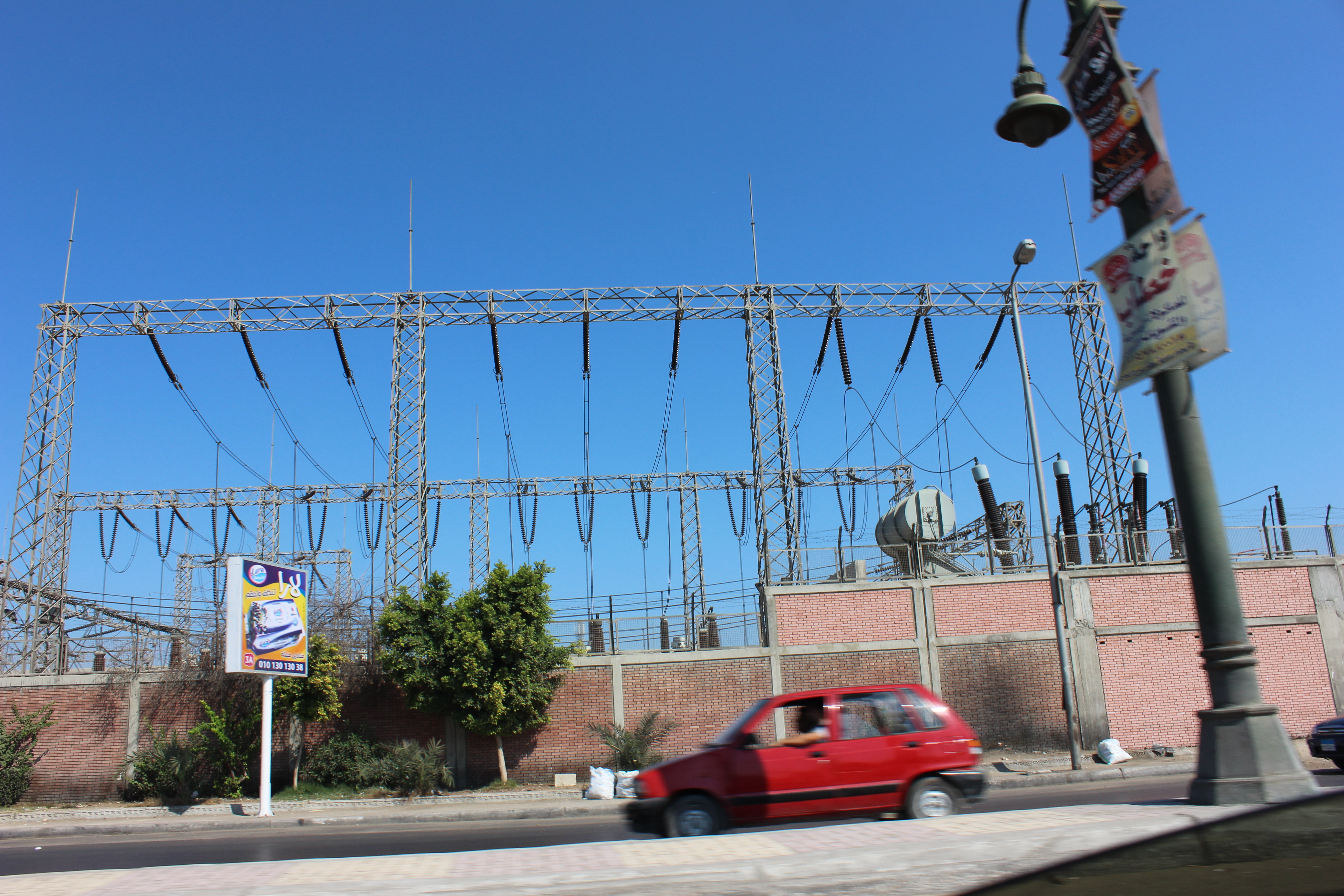 الطريق الدولي الساحلي بالإسكندرية.